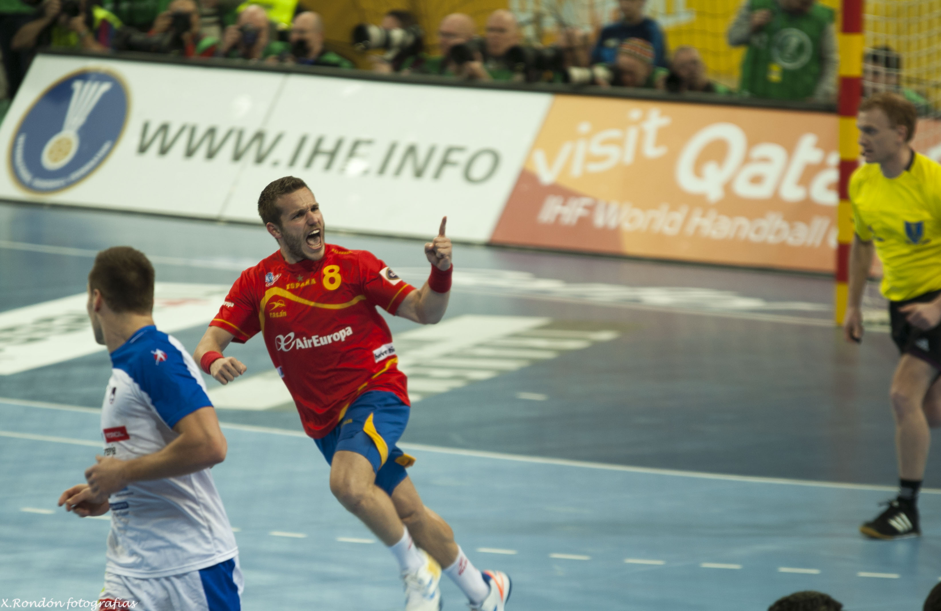 España-Eslovenia